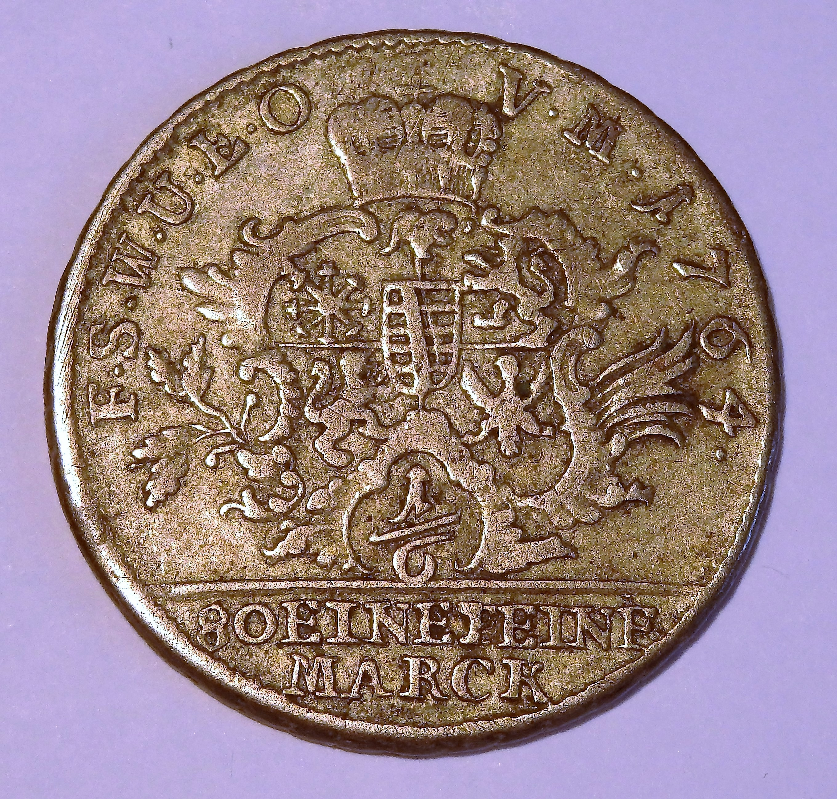 Wertseite des 1/6 Talers, "F.S.W.U.E.O. V.M." als Umschrift